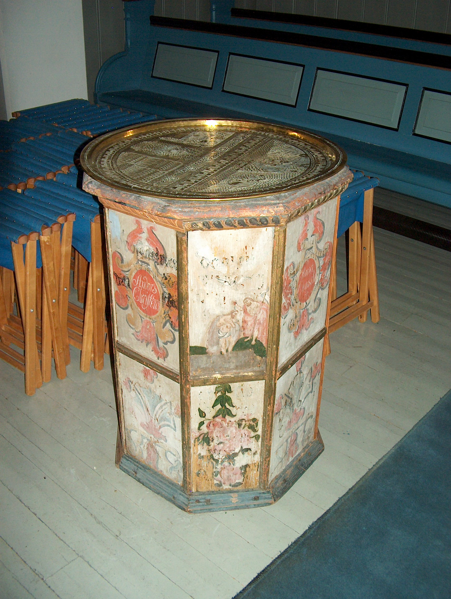 Lunder kirke, Sokna (døpefont, ca. 1725)